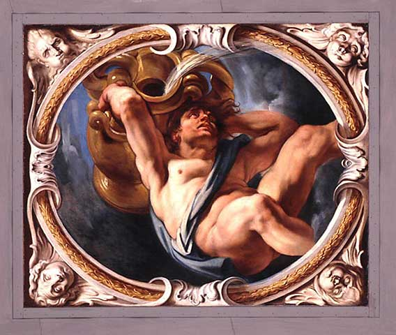 Les Signes du Zodiaque, Verseau